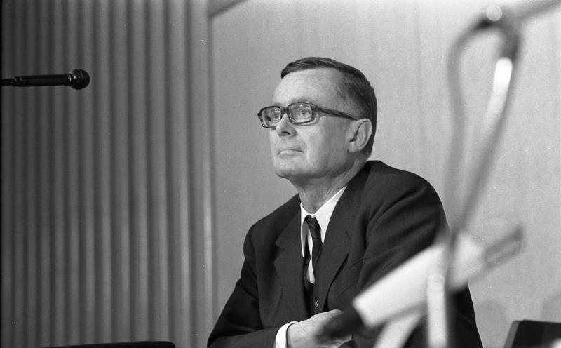 Pressekonferenz der SPD im Fraktionssaal der SPD (Bundeshaus) [Prof. Dr. Karl Schiller]